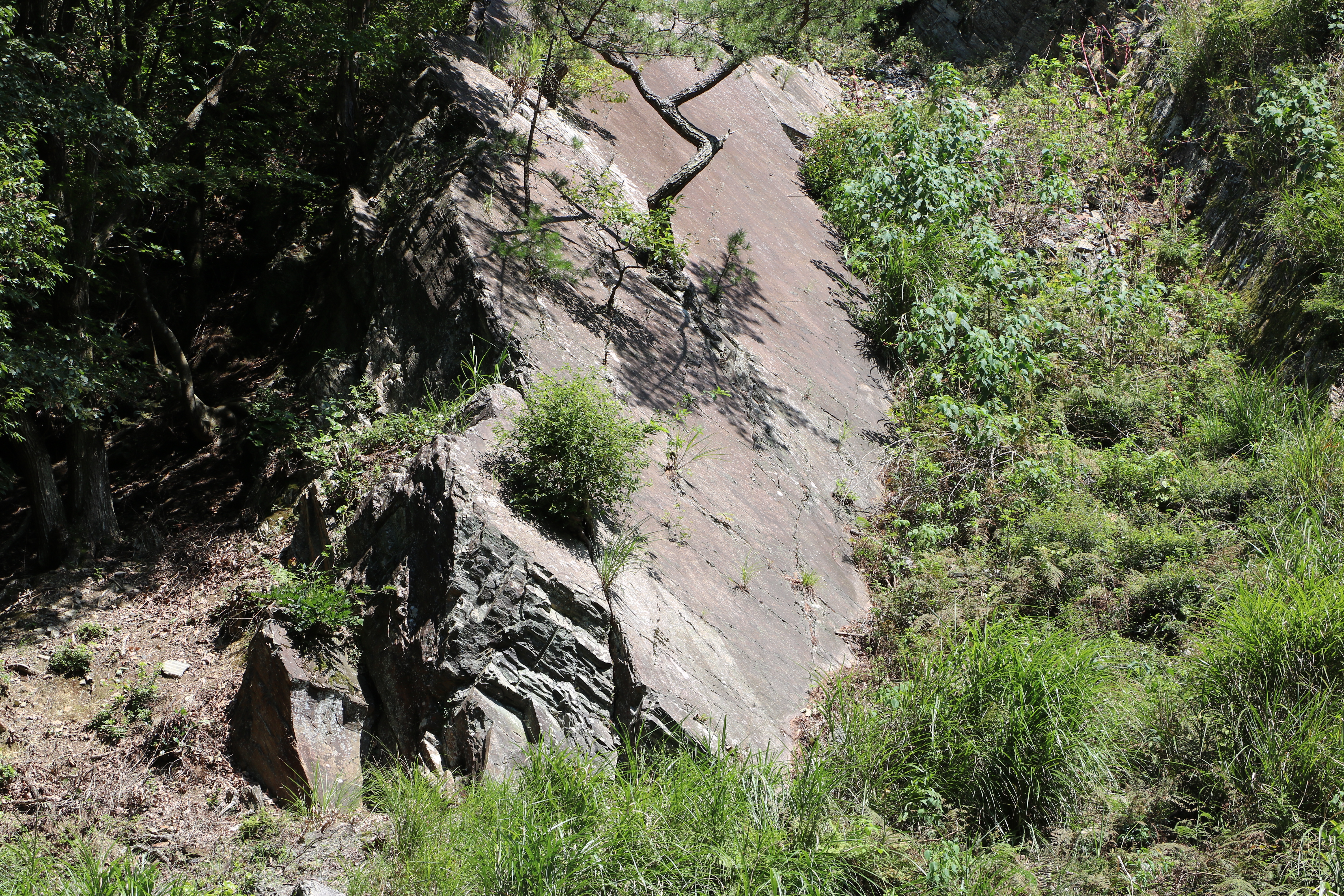 鎌掛の屏風岩（国指定天然記念物、滋賀県蒲生郡日野町）